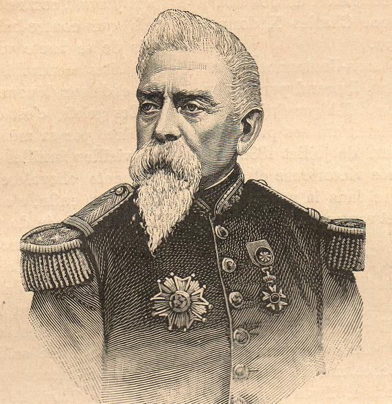 portrait Sylvain-François Jules Merle de la Brugière, comte de Laveaucoupet 1806-1892